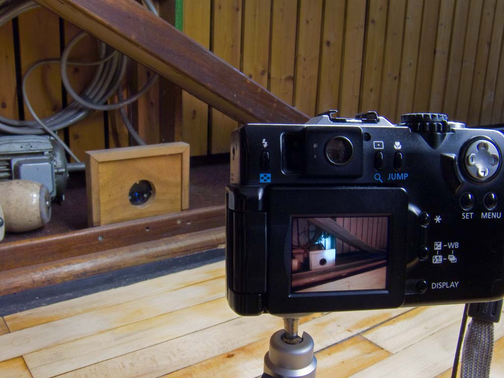 A tekepálya -beállításra szoruló- fotocellájának fénye a látható tartományban alig vehető ki, az infrafotózáshoz átalakított gép kijelzőjén azonban tisztán látható. Ez jelentősen megkönnyítette a szerkezet pontos beállítását, nem volt szükség a helyiség elsötétítésére, amihez a tekegép saját fénycsöveit is ki kellett volna venni. Ráadásul a korszerűbb gépeken található infrakapuk egyáltalán nem bocsátanak ki látható fényt (helyszín: Ristorante Belvedere, Unterhaching, Németország)